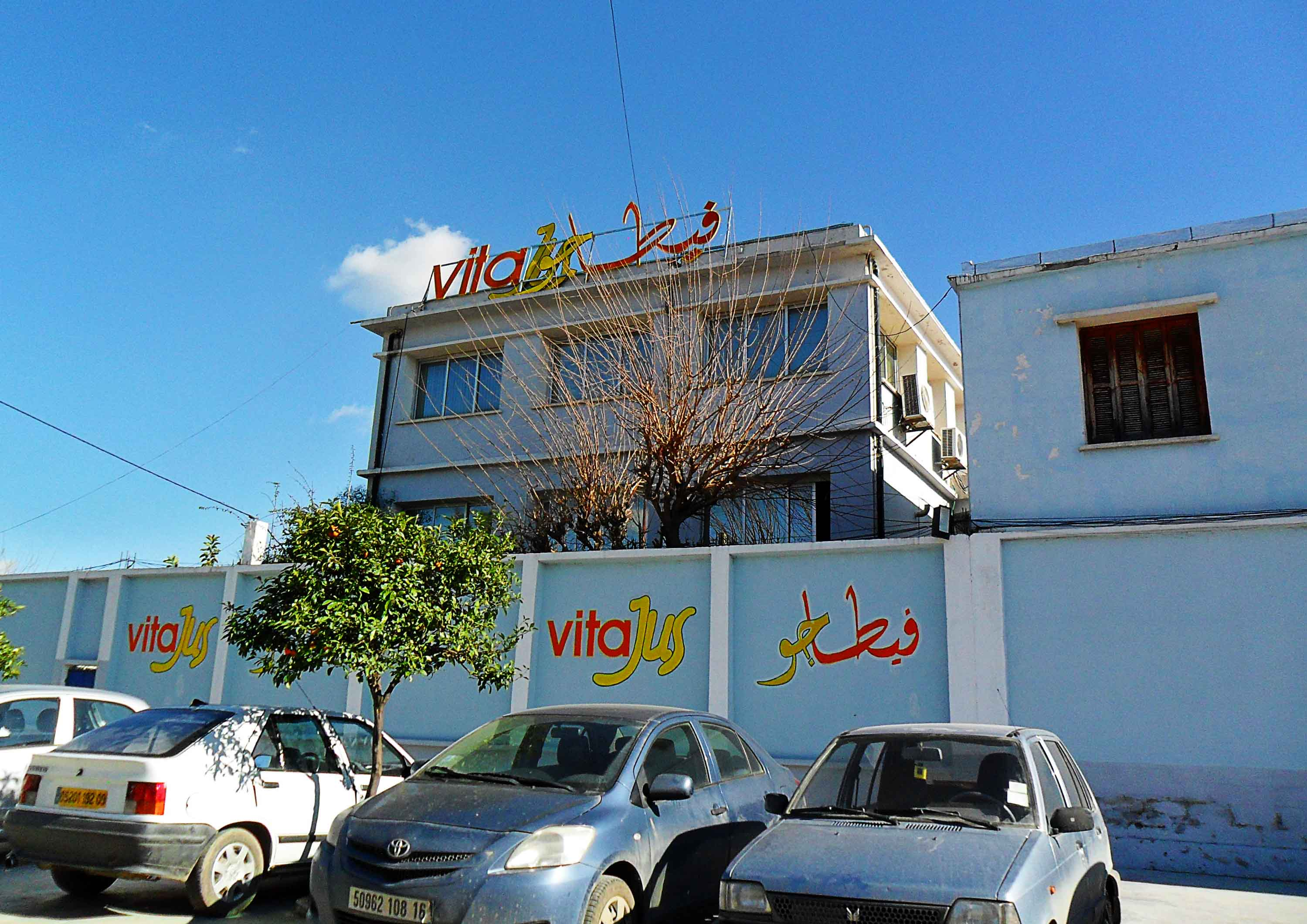 Vitajus فيطاجو